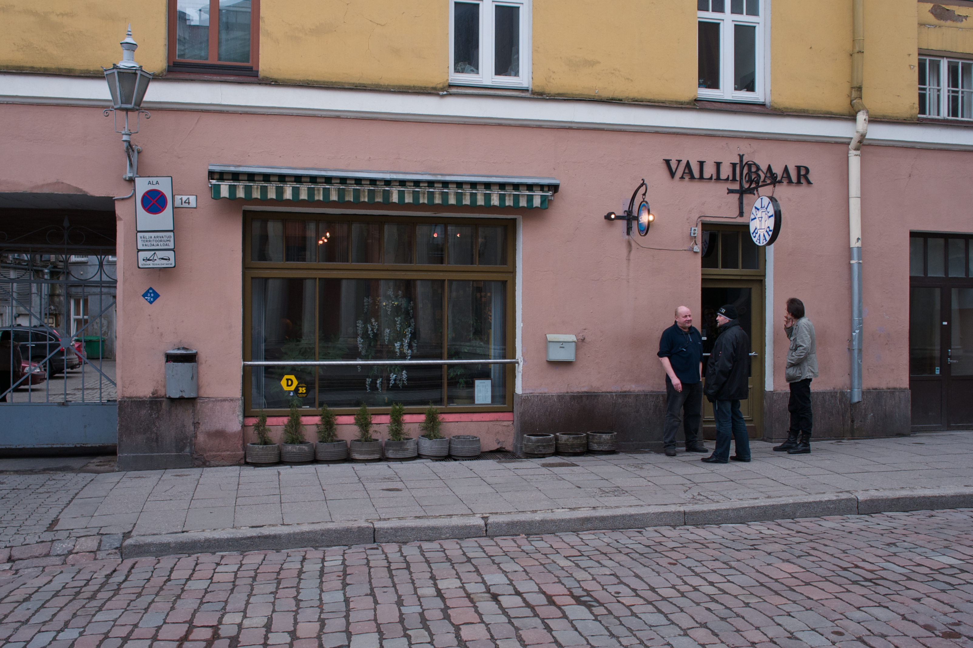 Valli baar Tallinna vanalinnas Müürivahe tänaval.